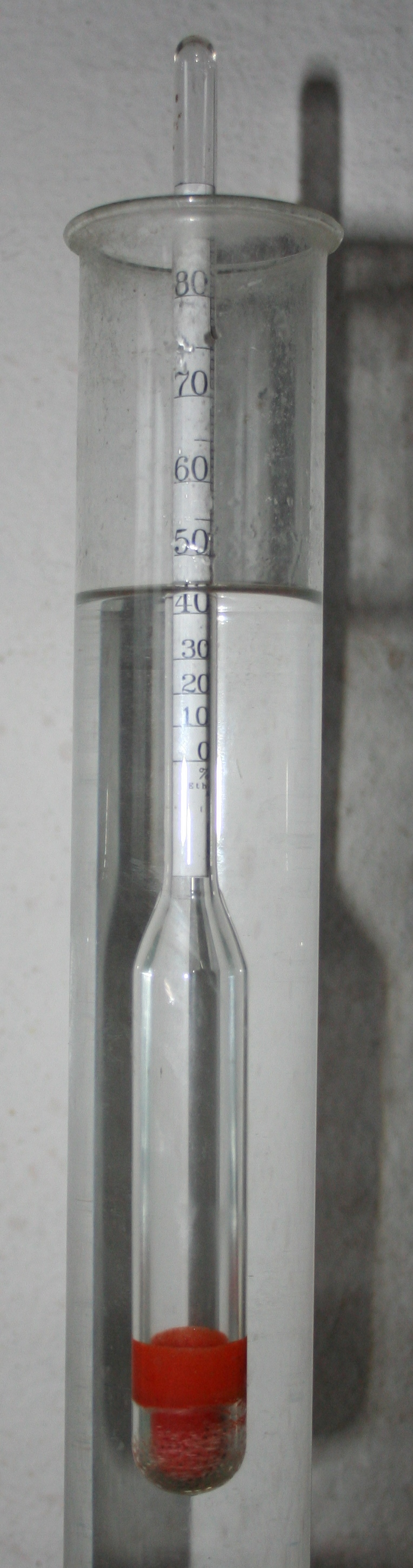 Aräometer in 44 %Vol. Flüssigkeit